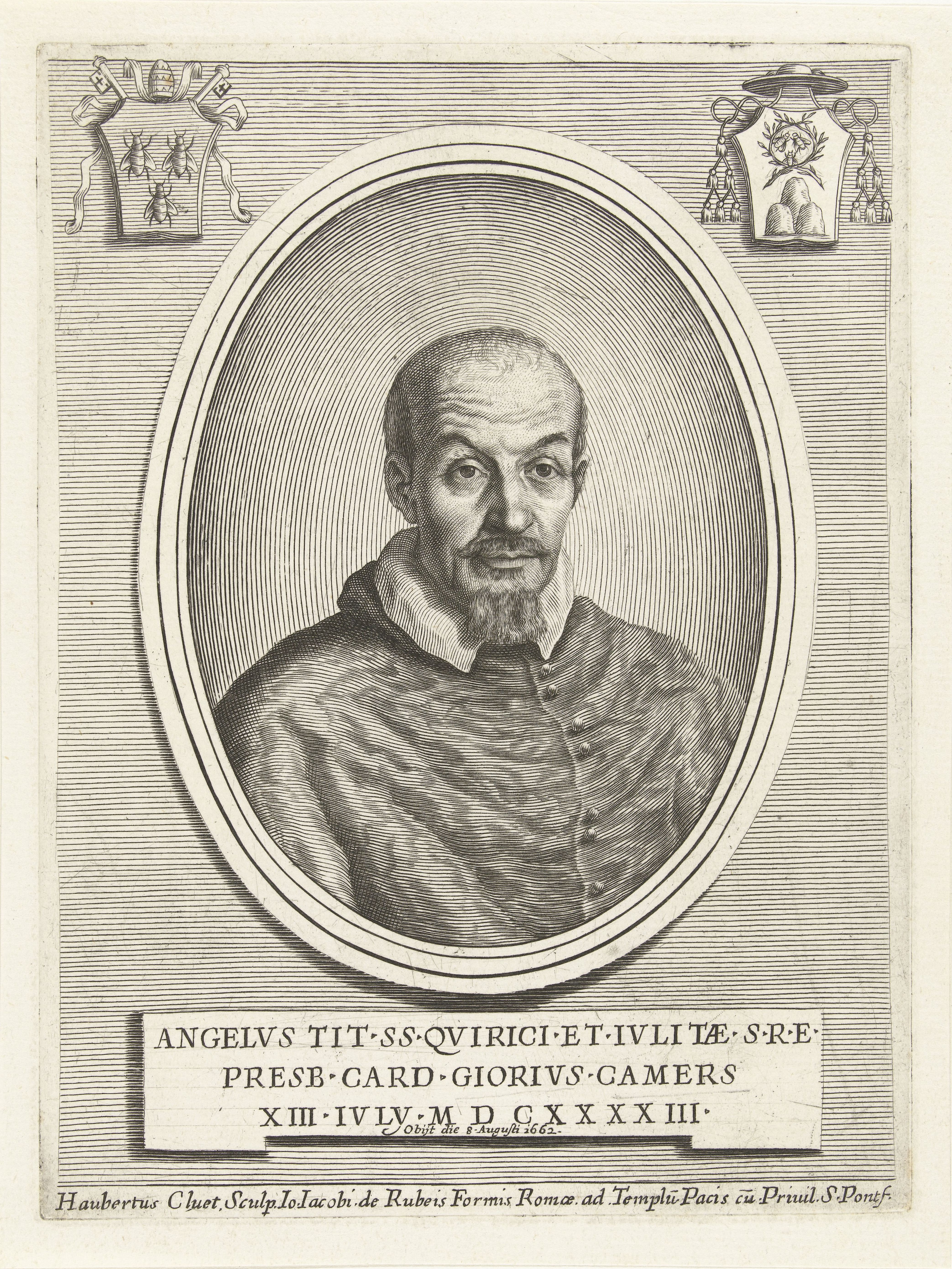 IdentificatieTitel(s): Portret van kardinaal Giori AngeloEffigies Cardinalium nunc viventium (serietitel)Objecttype: prent Objectnummer: RP-P-1909-4377Catalogusreferentie: Singer 32567Hollstein Dutch 8Opschriften / Merken: verzamelaarsmerk, verso midden, gestempeld: Lugt 2228Omschrijving: Portret in ovale lijst van kardinaal Giori Angelo. Buste frontaal. Bovenaan links het wapen van paus Urbanus VIII, bovenaan rechts het wapen van kardinaal Giori Angelo. De prent heeft een Latijns onderschrift met gegevens over de geportretteerde.VervaardigingVervaardiger: prentmaker: Albertus Clouwet (vermeld op object)naar eigen ontwerp van: Albertus Clouwetuitgever: Giovanni Giacomo de'Rossi (vermeld op object)Plaats vervaardiging: RomeDatering: 1662 - 1679Fysieke kenmerken: gravureMateriaal: papier Techniek: graveren (drukprocedé)Afmetingen: plaatrand: h 193 mm × b 143 mmToelichtingdeel van een serie met als titel "Effigies Cardinalium nunc viventum". De serie bestaat uit portretten van kardinalen.OnderwerpWie: Giori AngeloVerwerving en rechtenVerwerving: aankoop 1905Copyright: Publiek domein